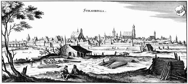 Straubing von Nord-Westen, Kupferstich, 13 x 30 cm